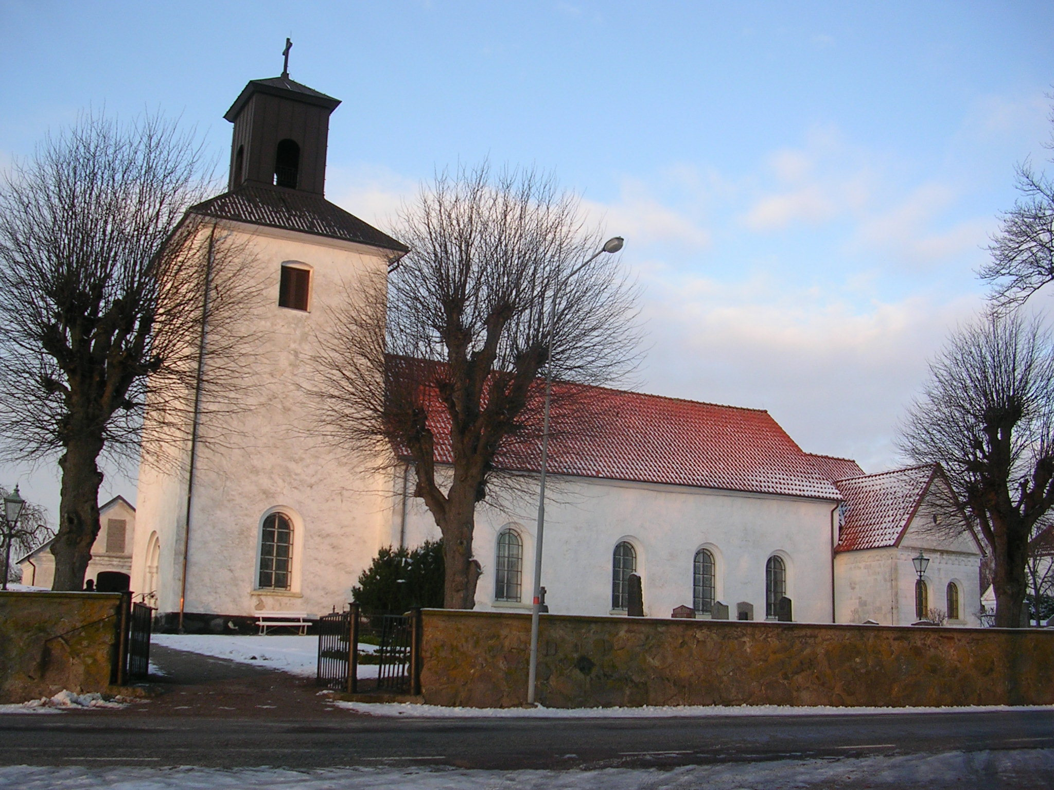 Harlösa kyrka Author: Väsk Date: November 2005